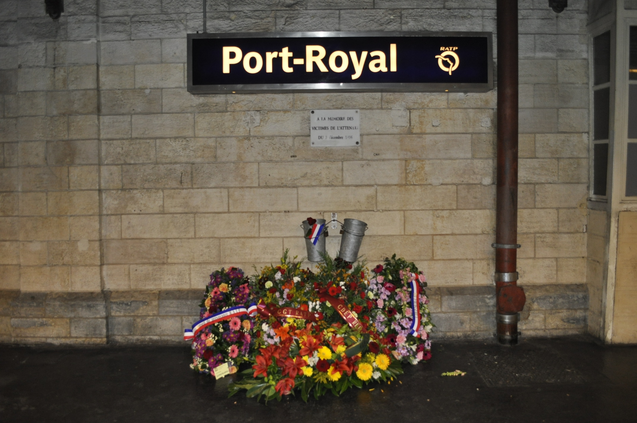 Plaque "A la mémoire des victimes de l'attentat du 3 décembre 1996" à la gare de Port Royal. La plaque est fleurie tous les ans.